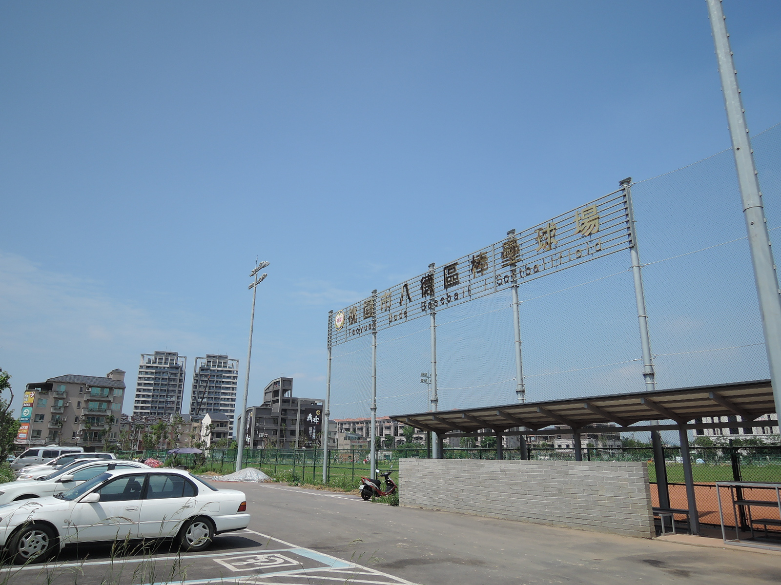 八德區棒壘球場